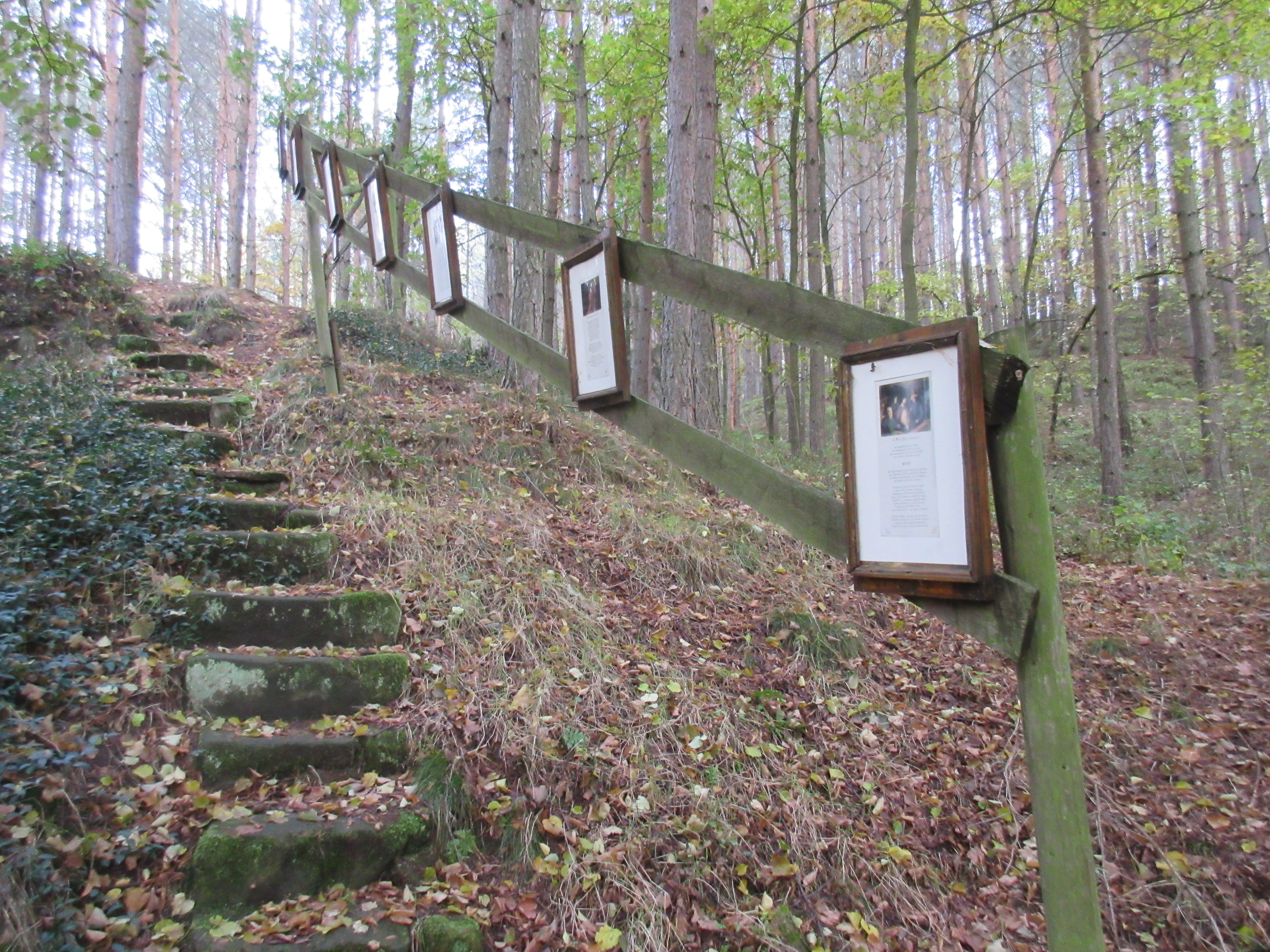 Poutní místo nedaleko Janovic